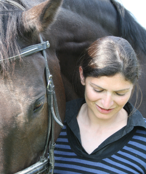 Moi-même et l'un de les chevaux, Jefferson II, Selle français. Photo pour la page Wikipédia à mon nom. Photographe M. Bruno Allanson, Photo mise en ligne avec son accord.